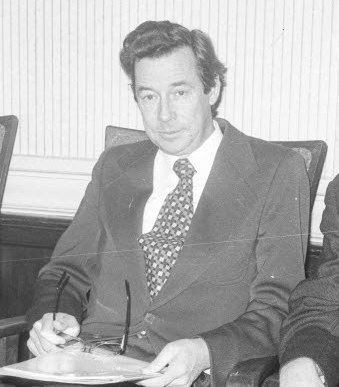 Der Amtschef des Justizministerium, Staatssekretär Wolfgang Böning (Bildmitte) verabschiedete den Leitenden Oberstaatsanwalt Traugott Albrecht (links) in den Ruhestand und führte dessen Nachfolger Lothar von Raab-Straube (rechts) in sein neues Amt als Leitender Oberstaatsanwalt ein.